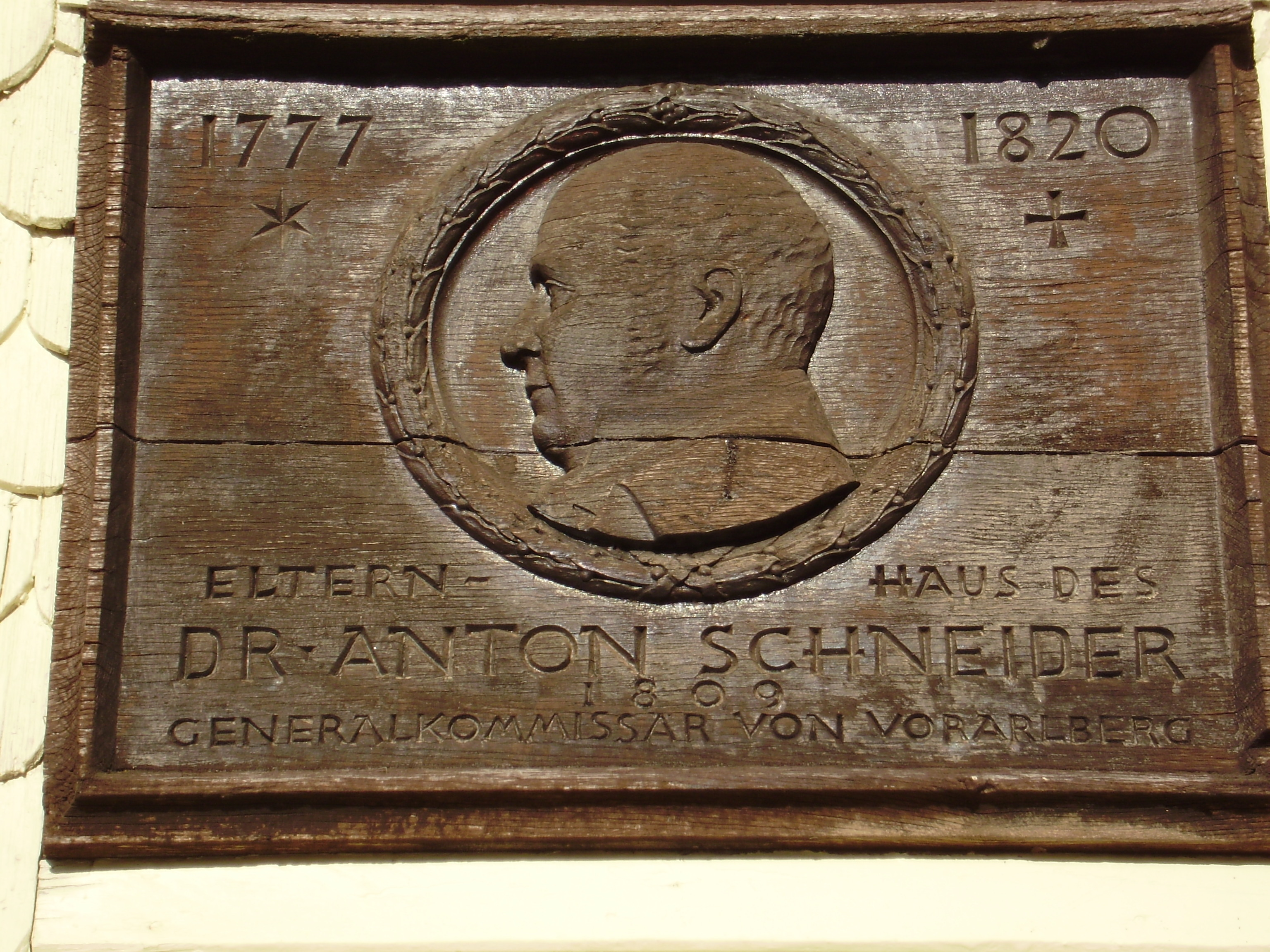 Erinnerungstafel am Elternhaus von Anton Schneider in Weiler im Allgäu, Bayern, Deutschland